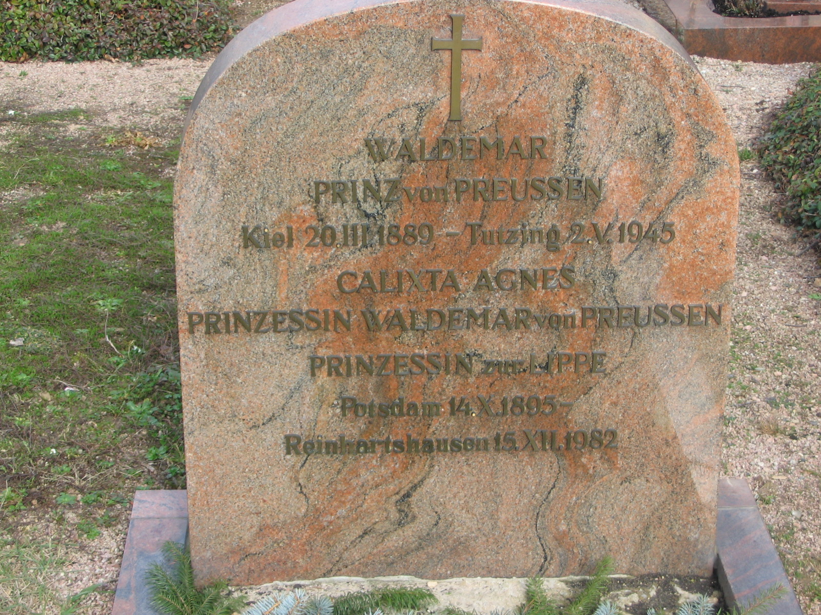 Grabstätte von Prinzessin Waldemar, gestorben zu Reinhartshausen, auf dem Friedhof von Erbach im Rheingau